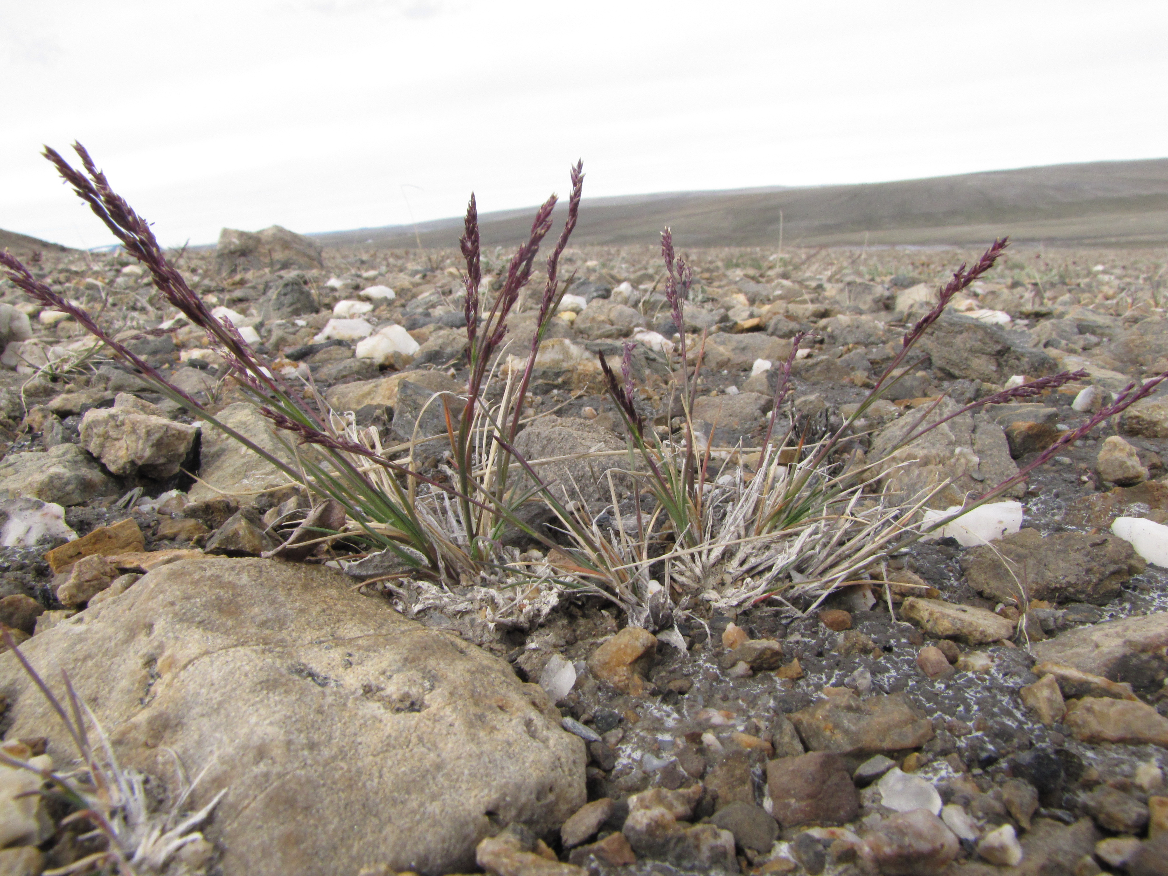 Поспелов И. Н. Фотография живых растений образца MW0158055 из коллекции "Гербарий МГУ" // Депозитарий живых систем "Ноев Ковчег" (направление "Растения"): Электронный ресурс. – М.: МГУ, 2018. – Режим доступа: (дата обращения 31.03.2018). – Лицензия CC-BY 4.0.